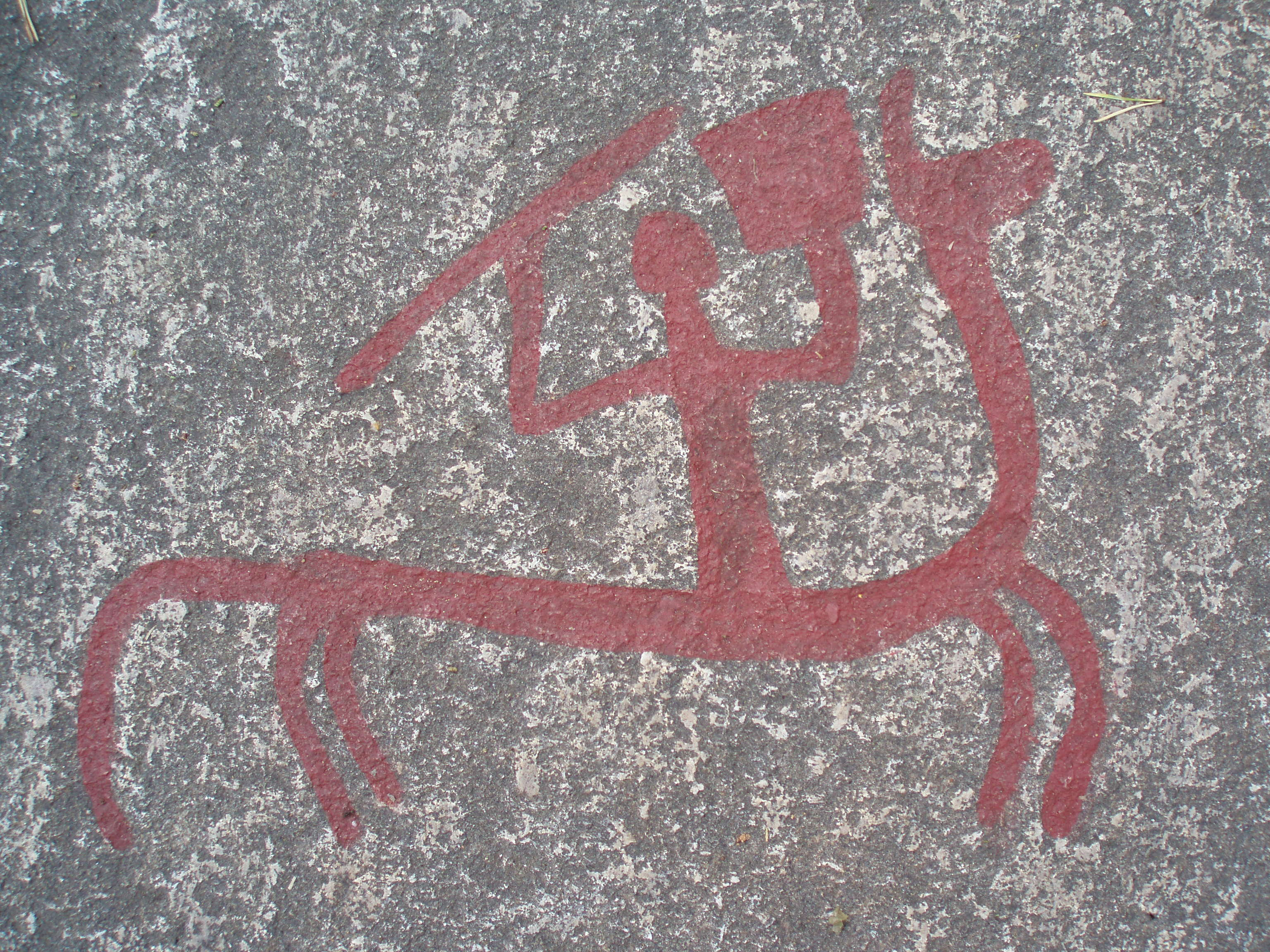 Bronzezeit, Bronze Age, âge du bronze, Felsritzungen, stonecarvings, Gravures rupestres, Reiterkampf, horseriders, cavaliers